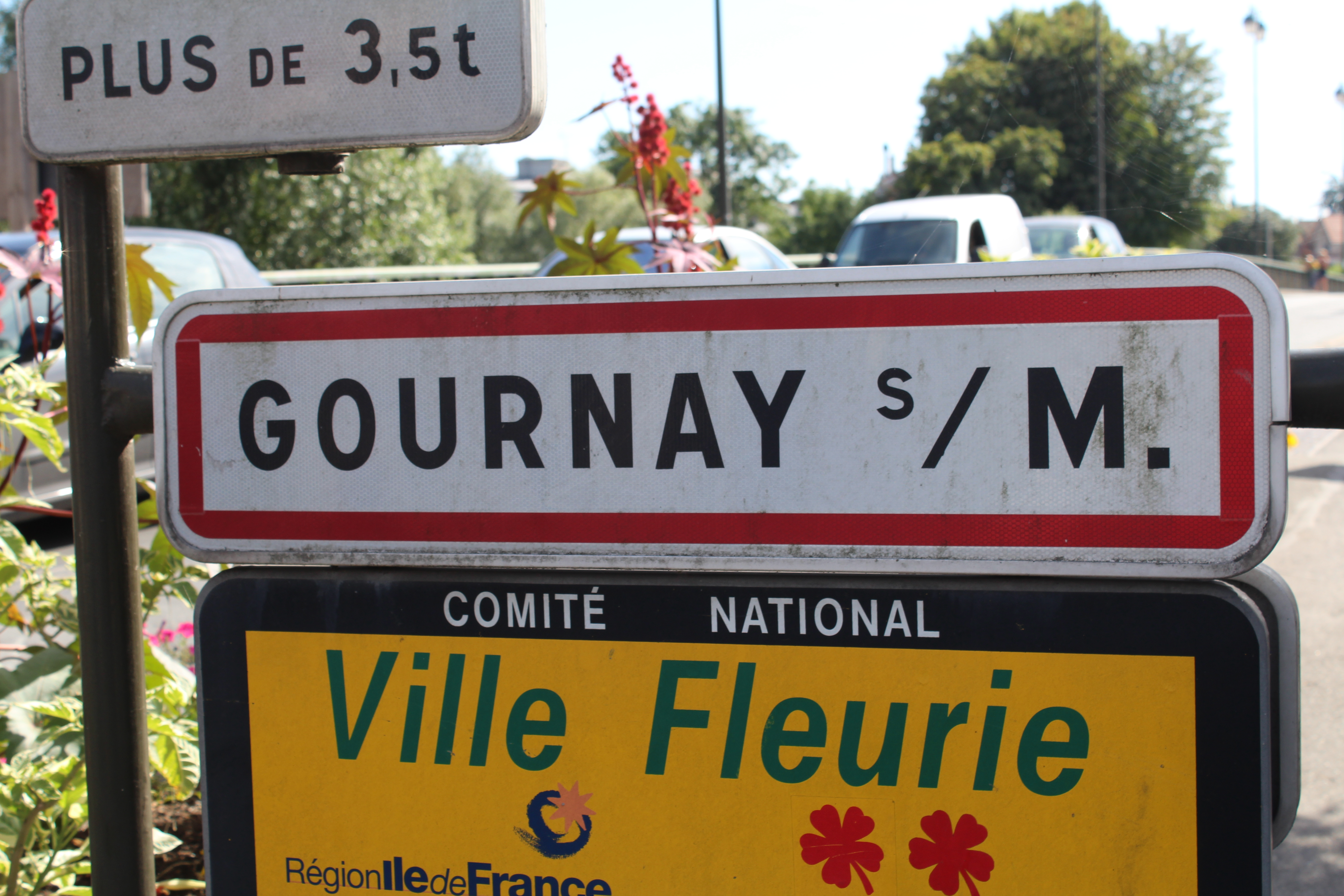 Panneau d'entrée dans Gournay-sur-Marne.